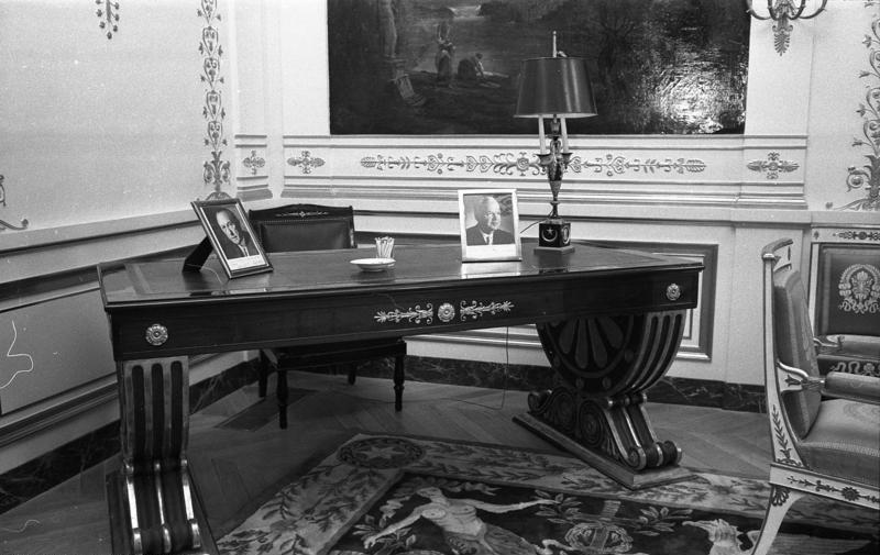 Einweihung der deutschen Botschaftsresidenz, Palais Beauharnais, in Paris. 2-8 Bürgermeister Schmücker und Bürgermeister Wehner besichtigen das Palais.